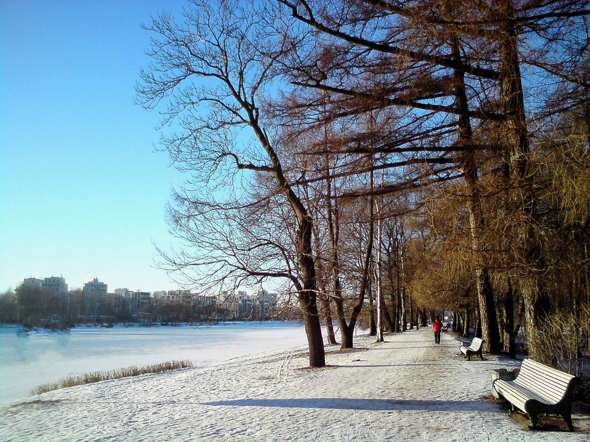 Набережная Средней Невки зимой